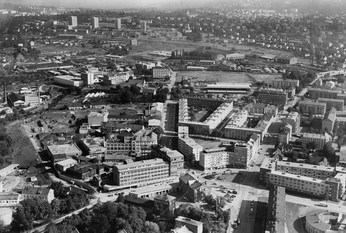 Sandaker i Oslo ca. 1965. Sandakerveien midt i bildet, Grefsenveien til høyre.